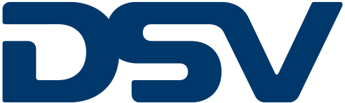 logo DSV